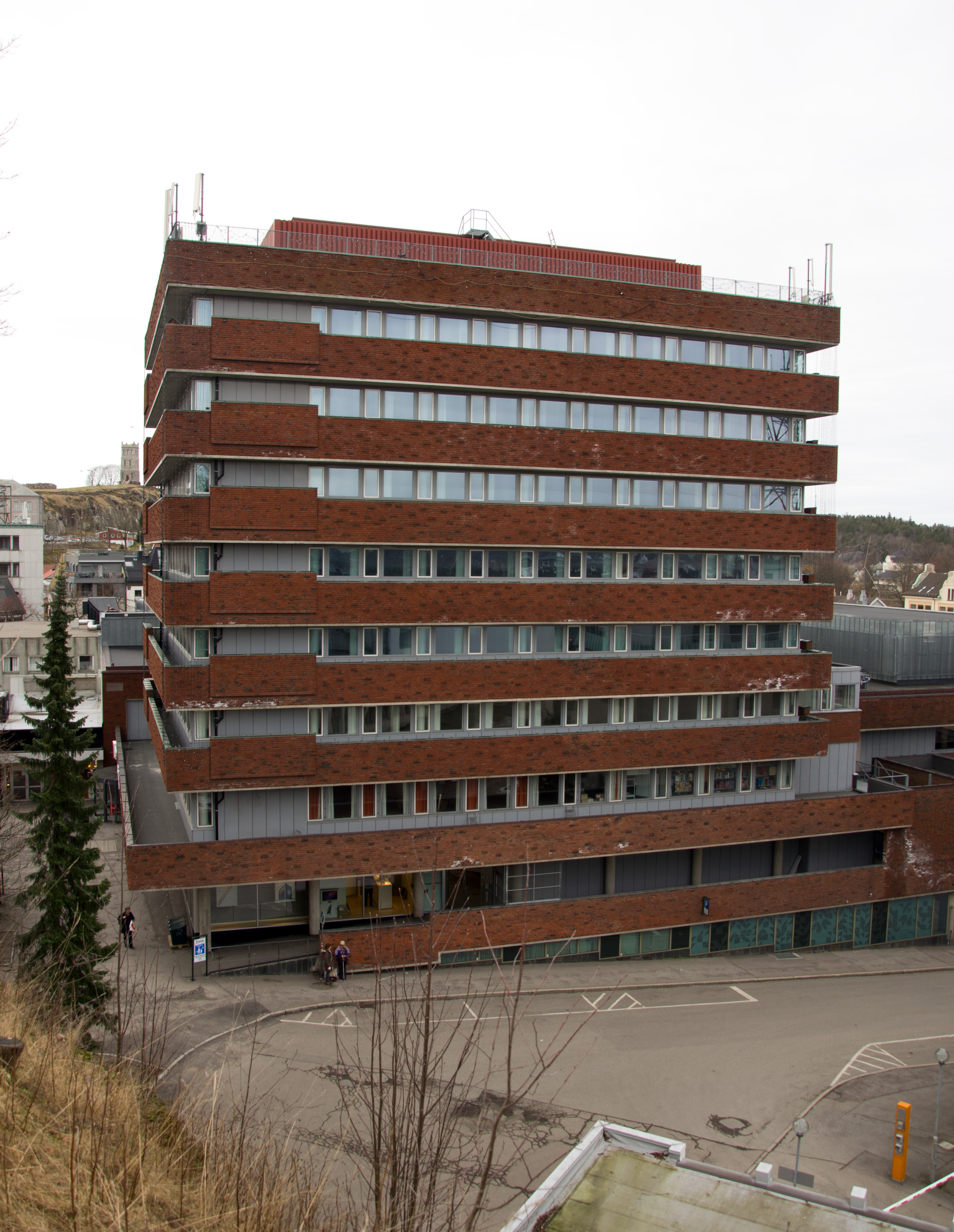 Haugatingsgaten og Stoltenbergs gate 1 i Tønsberg